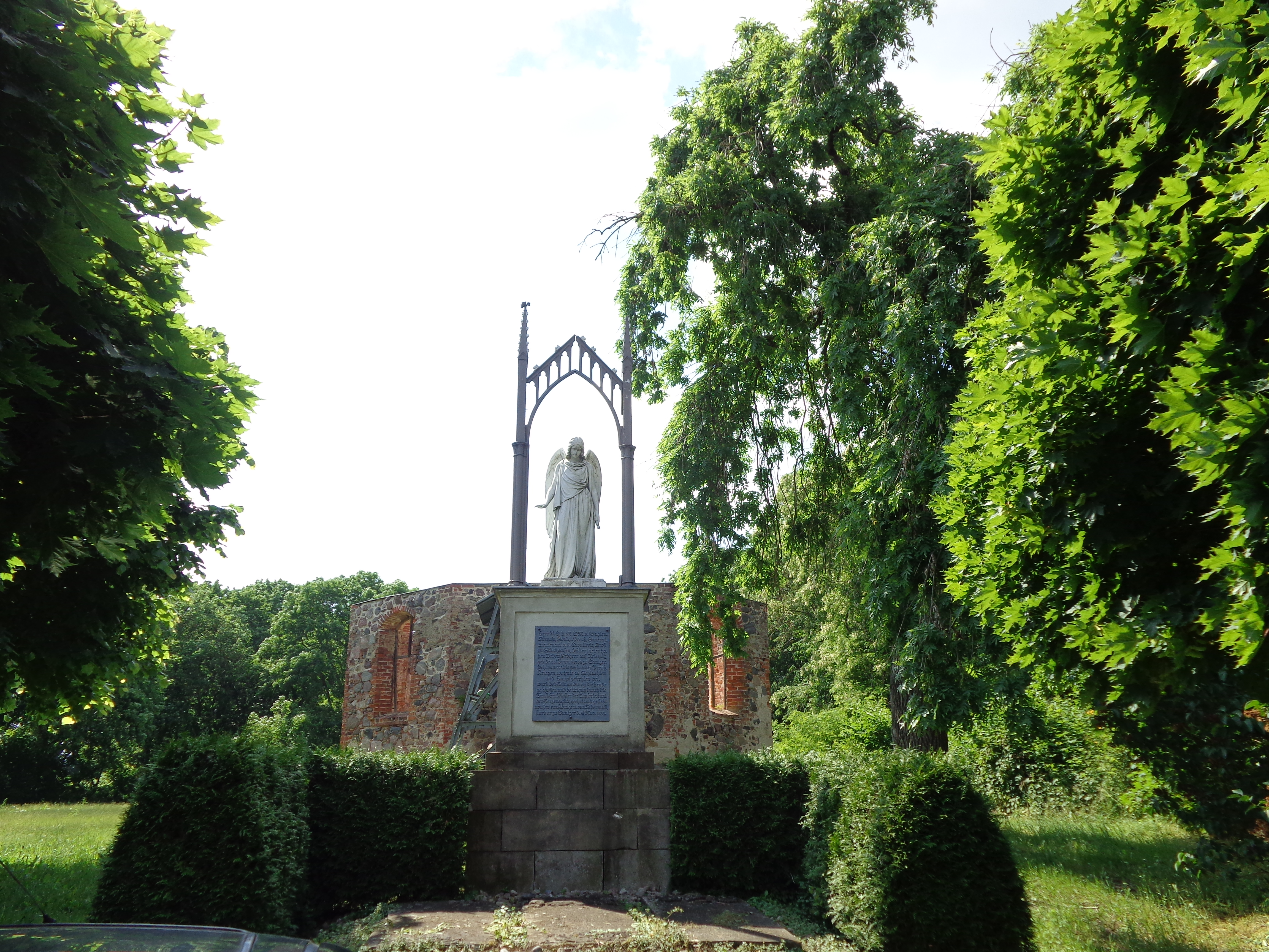 Denkmal Jürgaß vor der Kirchenruine Ganzer, Ganzer, Ortsteil der Gemeinde Wusterhausen/Dosse, Lkr. Ostprignitz-Ruppin, Brandenburg